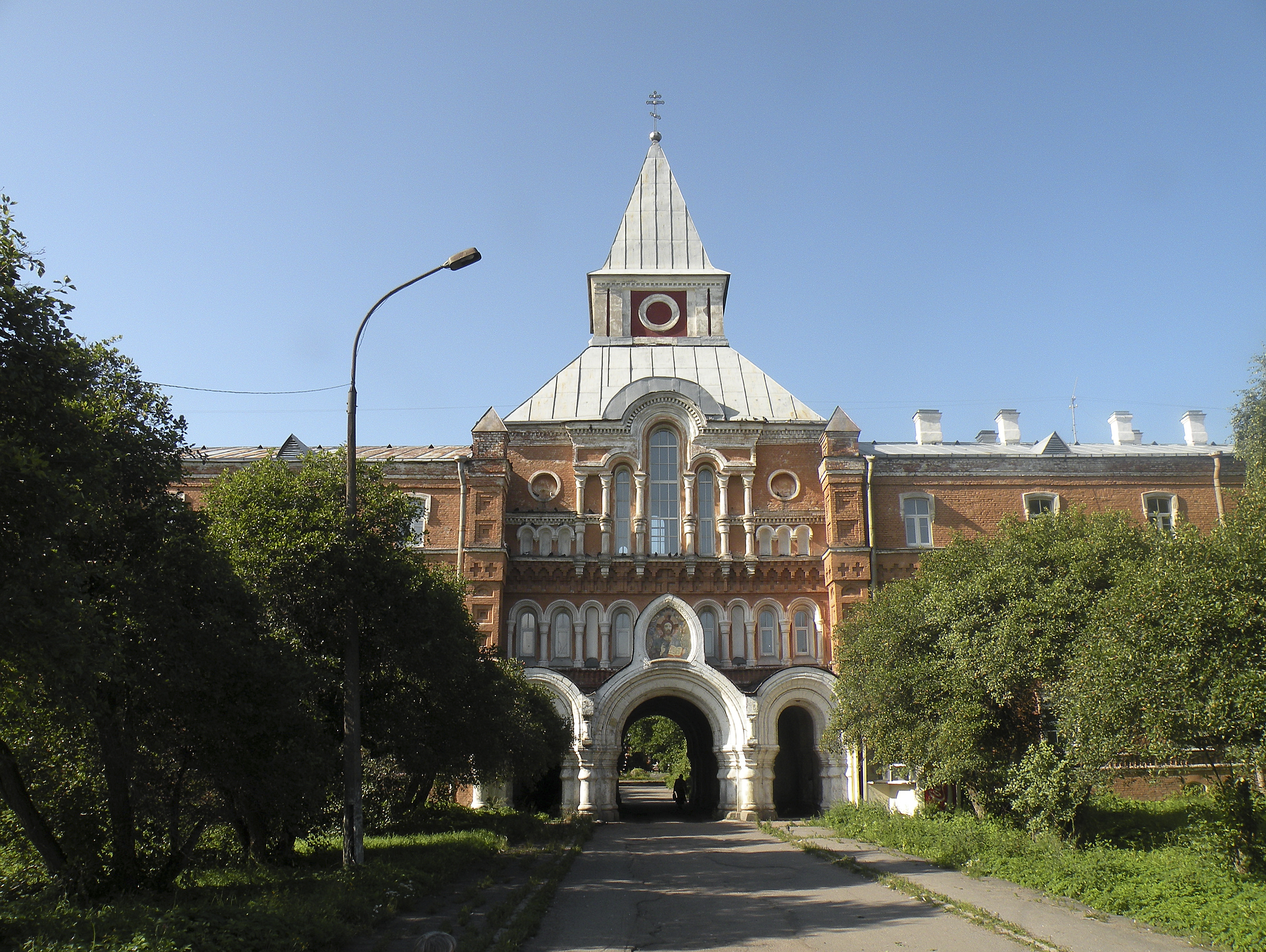 Входные ворота Приморской пустыни